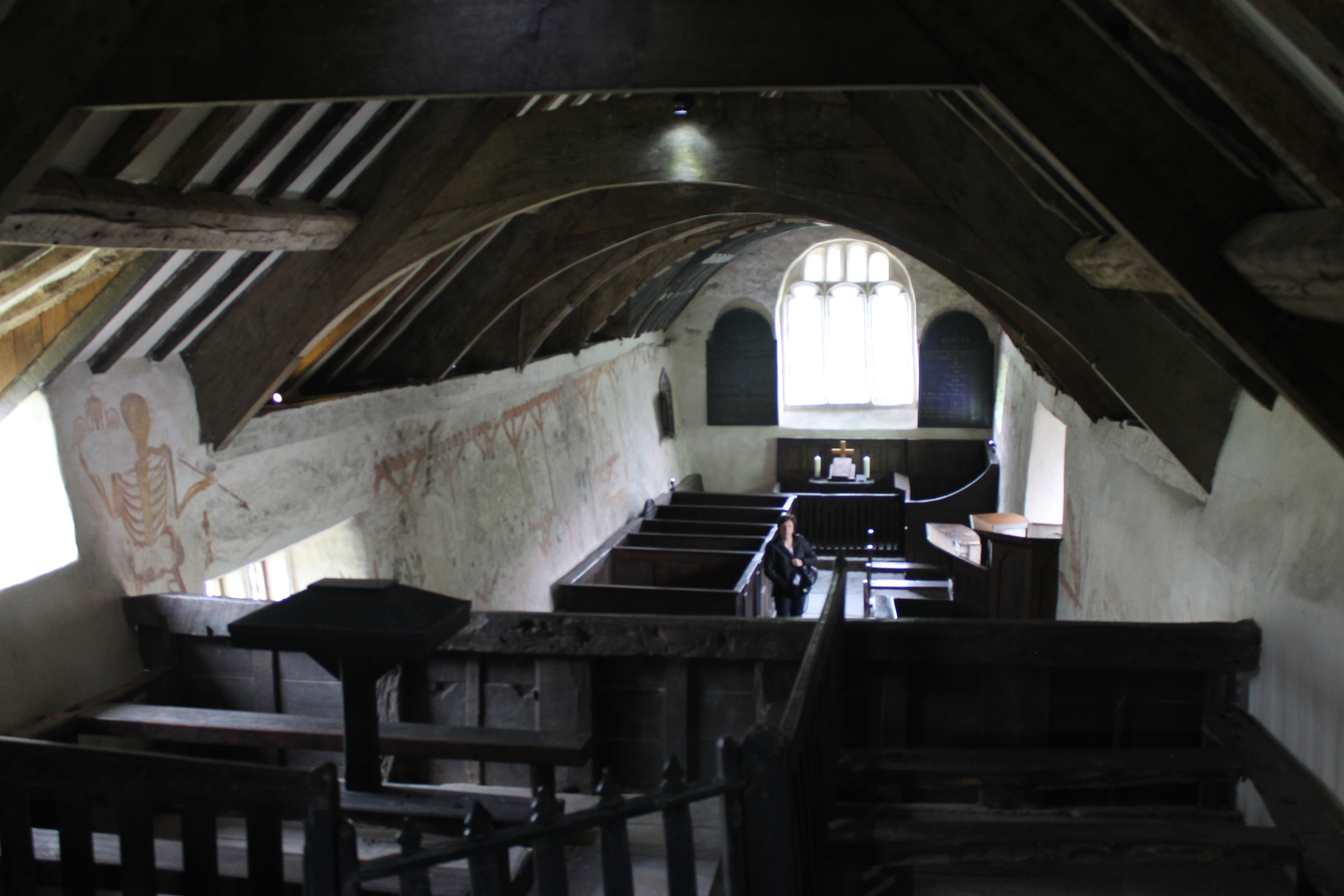 Eglwys yr Holl Sant, Llangar ger Corwen Sir Ddinbych.